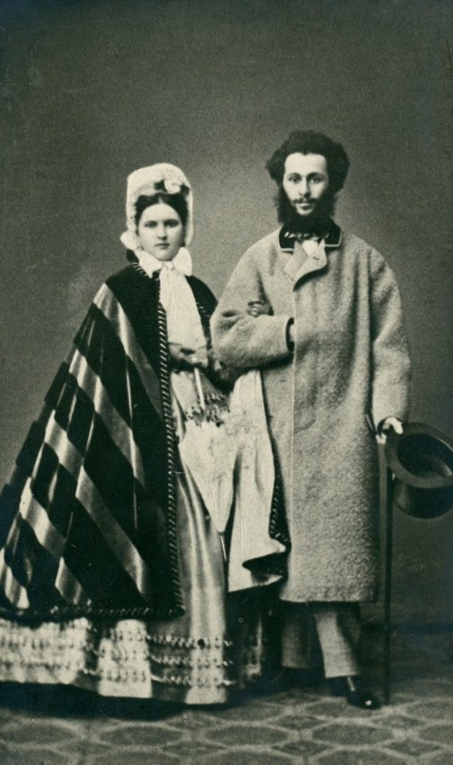 Акакий Ростомович Церетели с женой Натальей Петровной, ур. Базилевской.